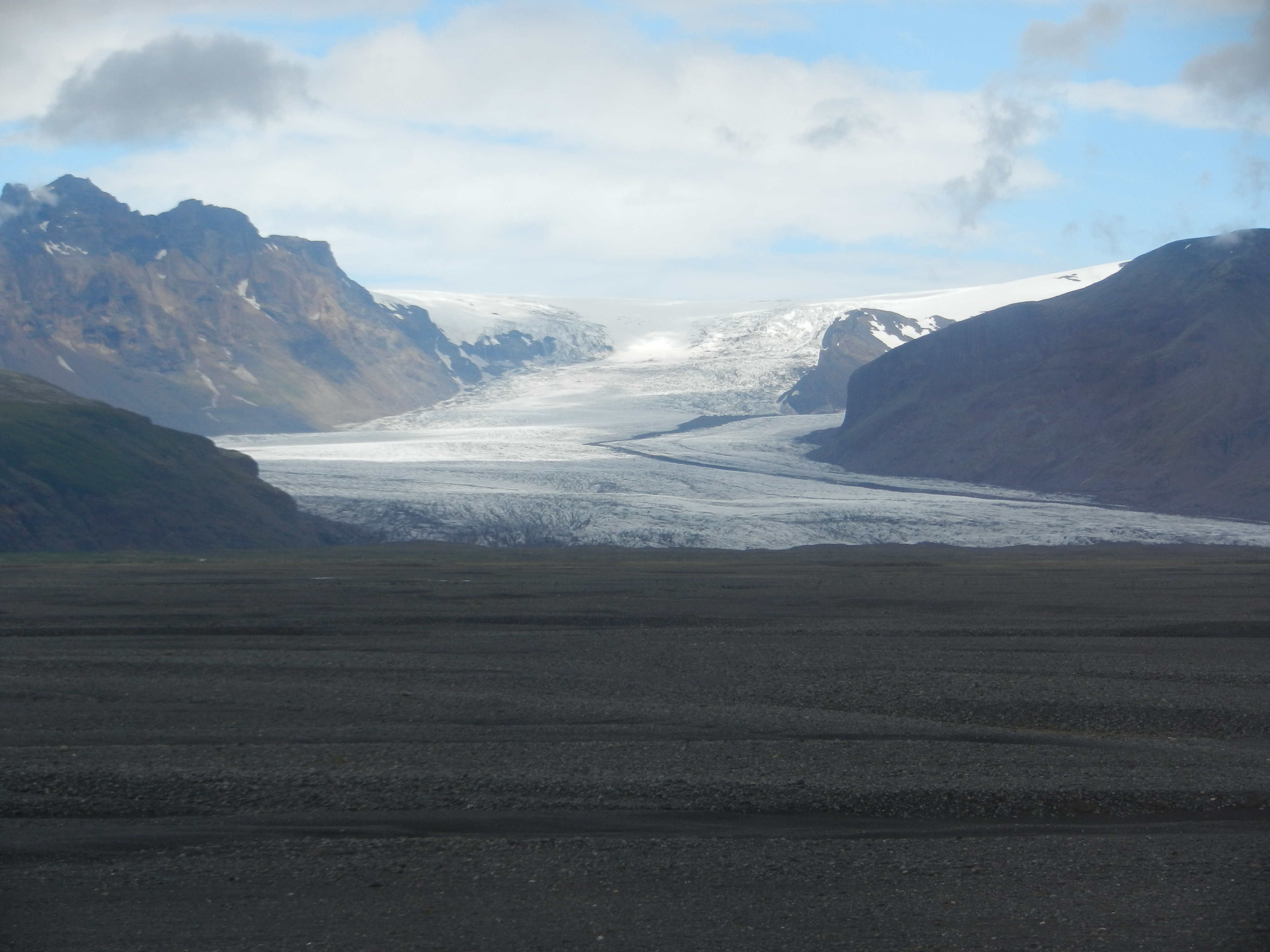 Ledenik Skaftafellsjökull je del ledenega pokrova Vatnajökull, Islandija.